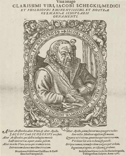 Jakob Schegk d.i. Degen (Holzschnitt nach einem Ölgemälde)